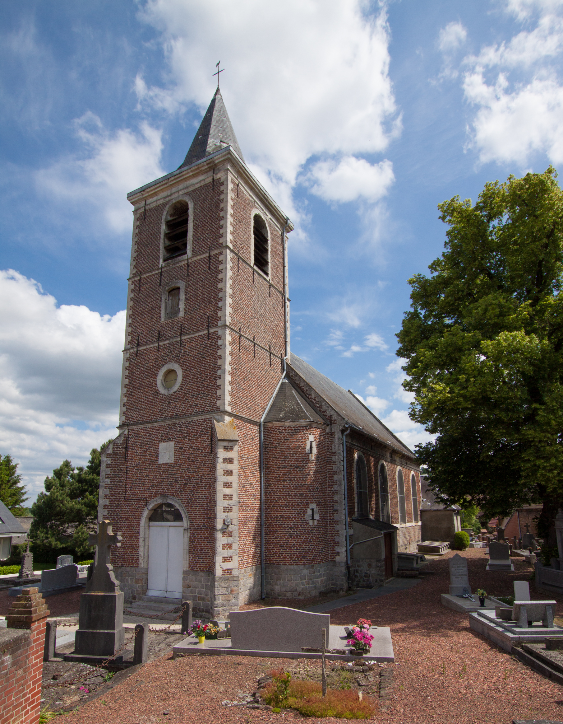 Fouquieres Churchyard